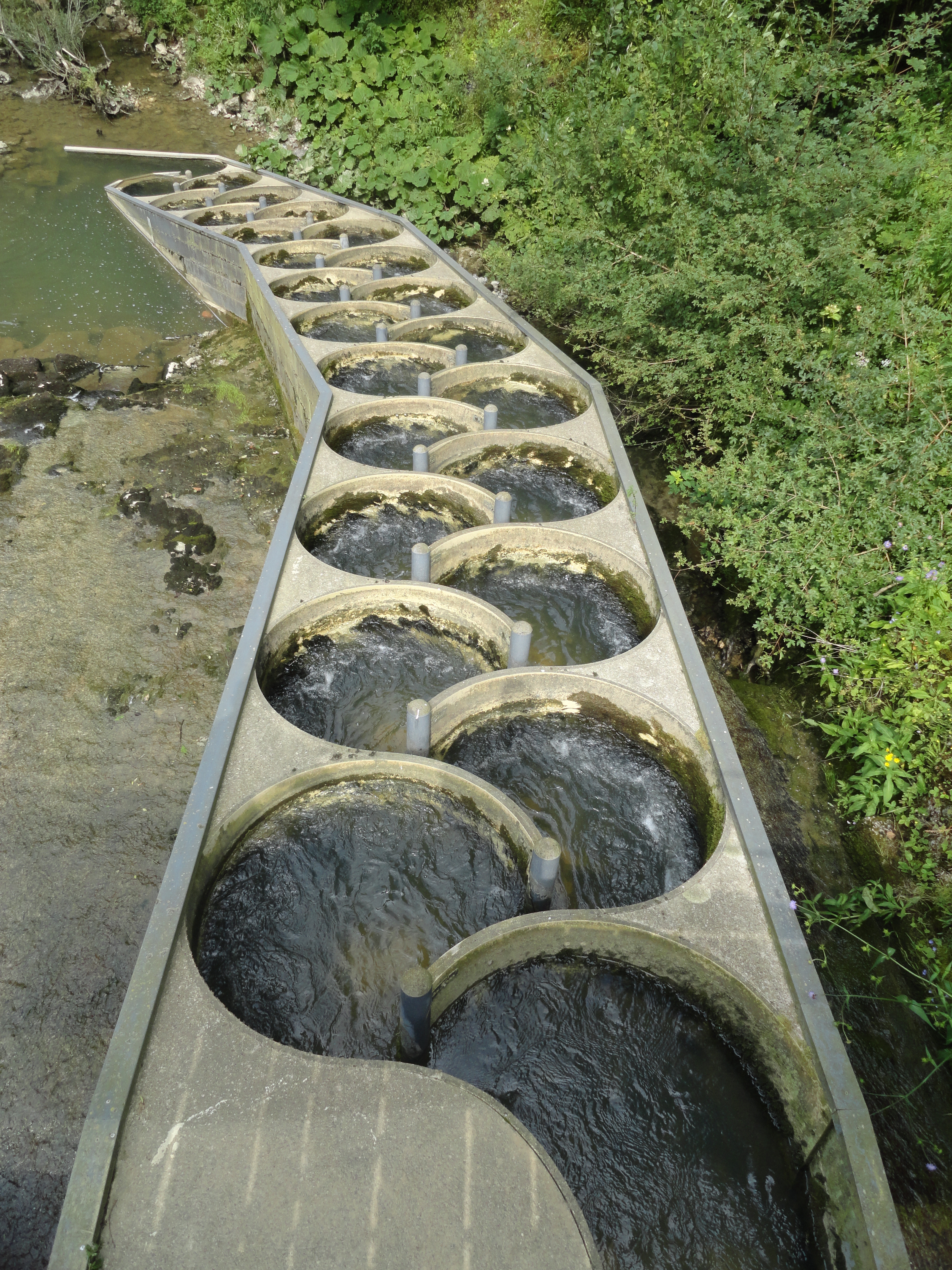 Fischtreppe („Mäander-Fischpass“) an der Sorne in der Gorges du Pichoux (Pichoux-Schlucht), Delémont, Kanton Jura, Schweiz – Es handelt sich um einen Fertigteilfischpass mit 24 Becken und einer Fallhöhe von 3,80 m, gebaut im Jahr 2008 (Mäander-Fischpass Typ 1516 C 1,00)